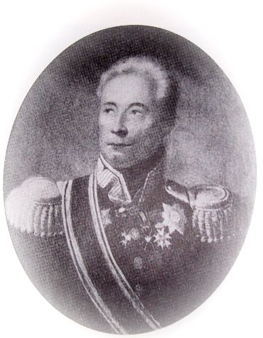 Ignacy Aleksander Blumer (1773-1830)– generał brygady wojsk Królestwa Kongresowego,.